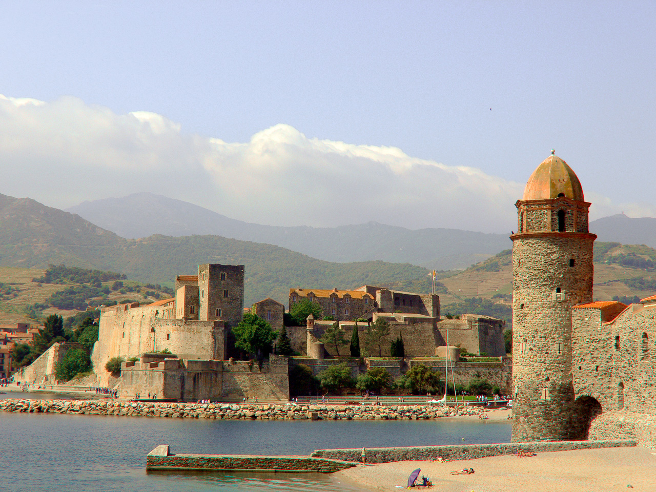 Collioure vue sur le château royal et le clocher